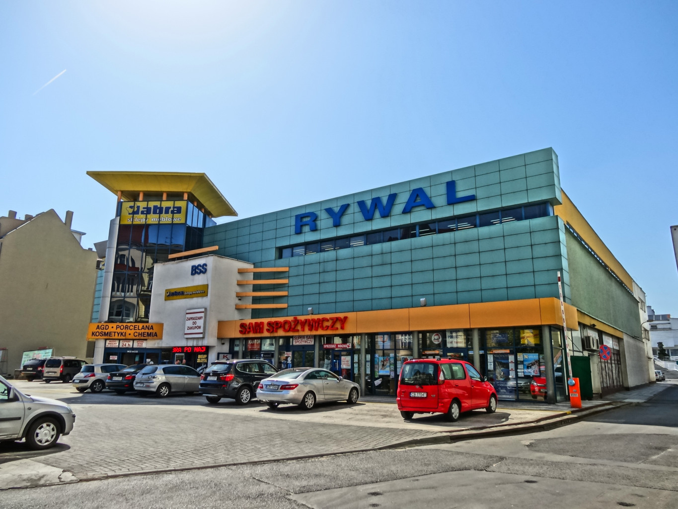 Dom Handlowy "Rywal" w Bydgoszczy przy ul. Gdańskiej